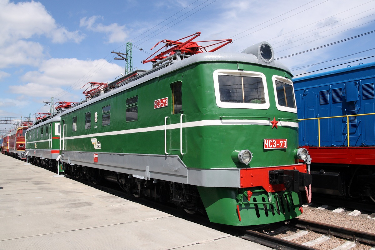 До конца 1980 х эксплуатировался в ТЧ Барабинск. После находился на б/з Кожурла. Восстановлен в объеме ТР-3 перед постановкой в МЖТ Сеятель. (По данным "Сайт Андрея Полеводы")